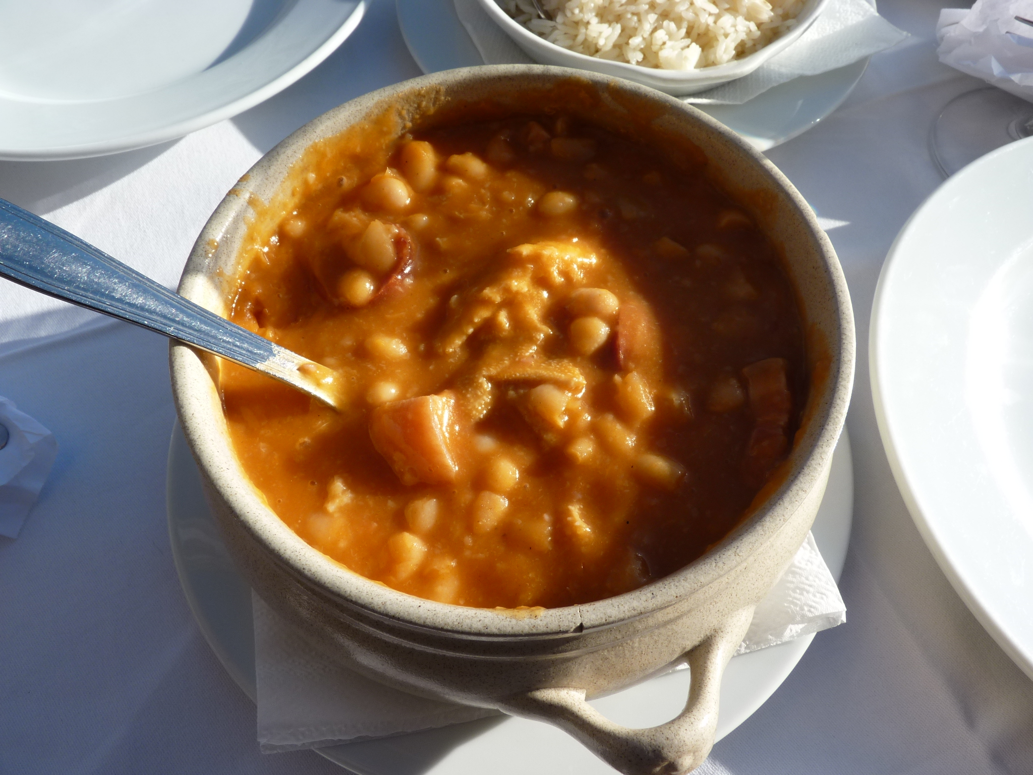 Tripas à moda do Porto, cais da Ribeira, Porto, Portugal